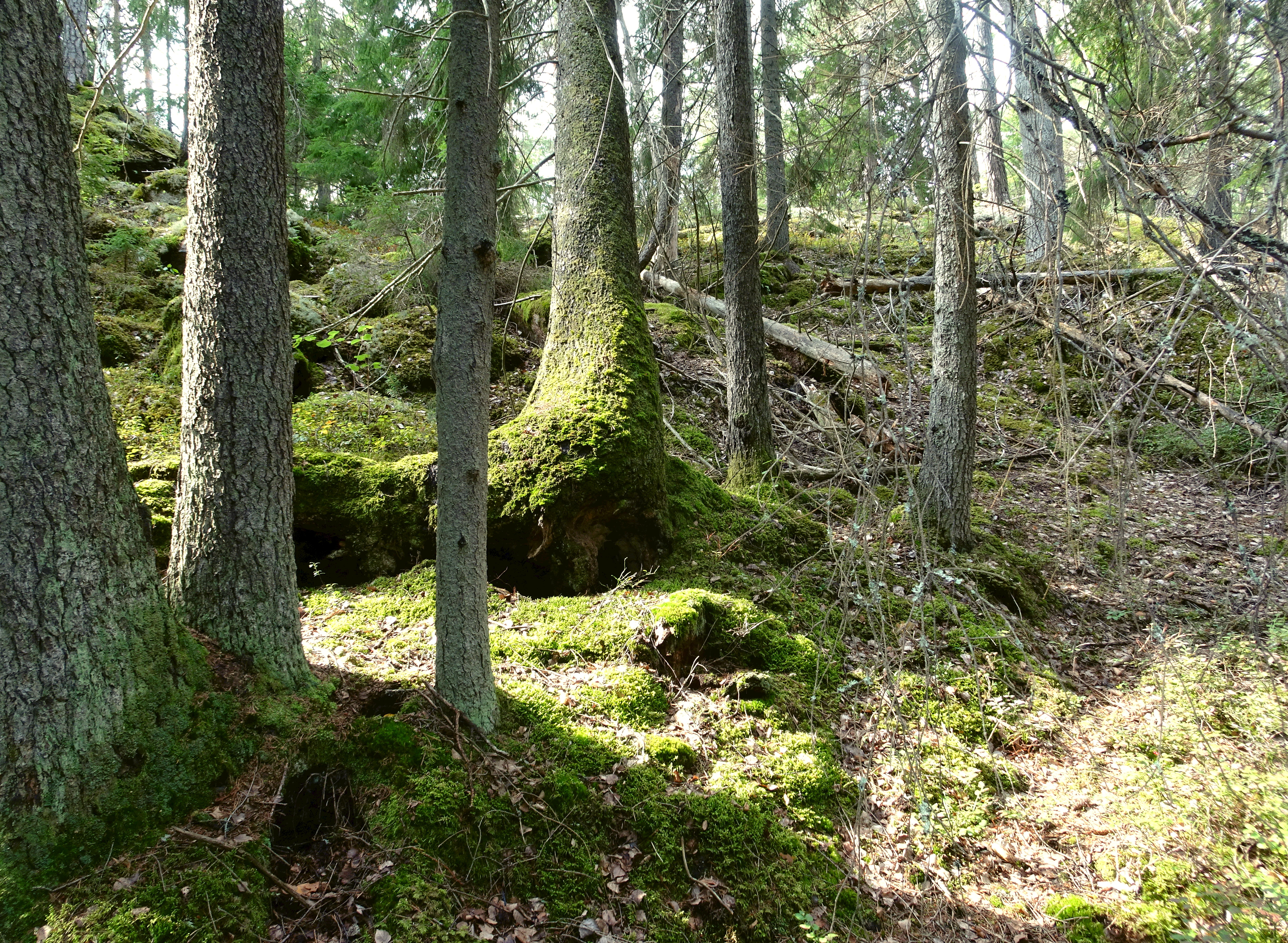 Bårsjöns naturreservat